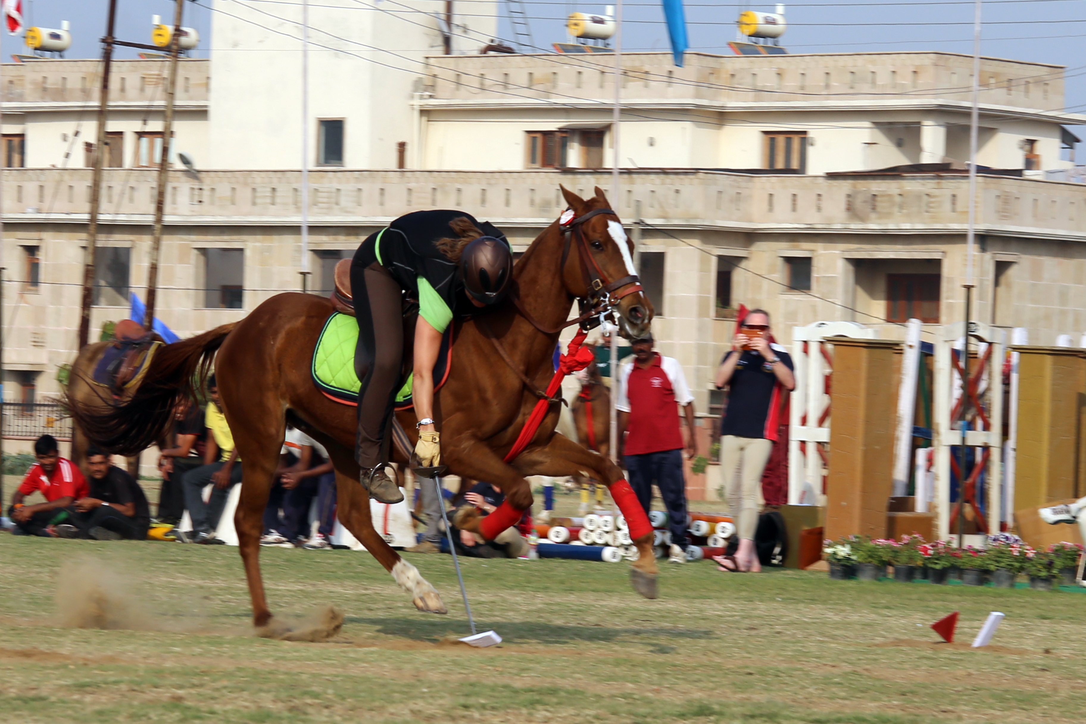 "Individual Lance" tentpegging competition at a tournament in South Africa